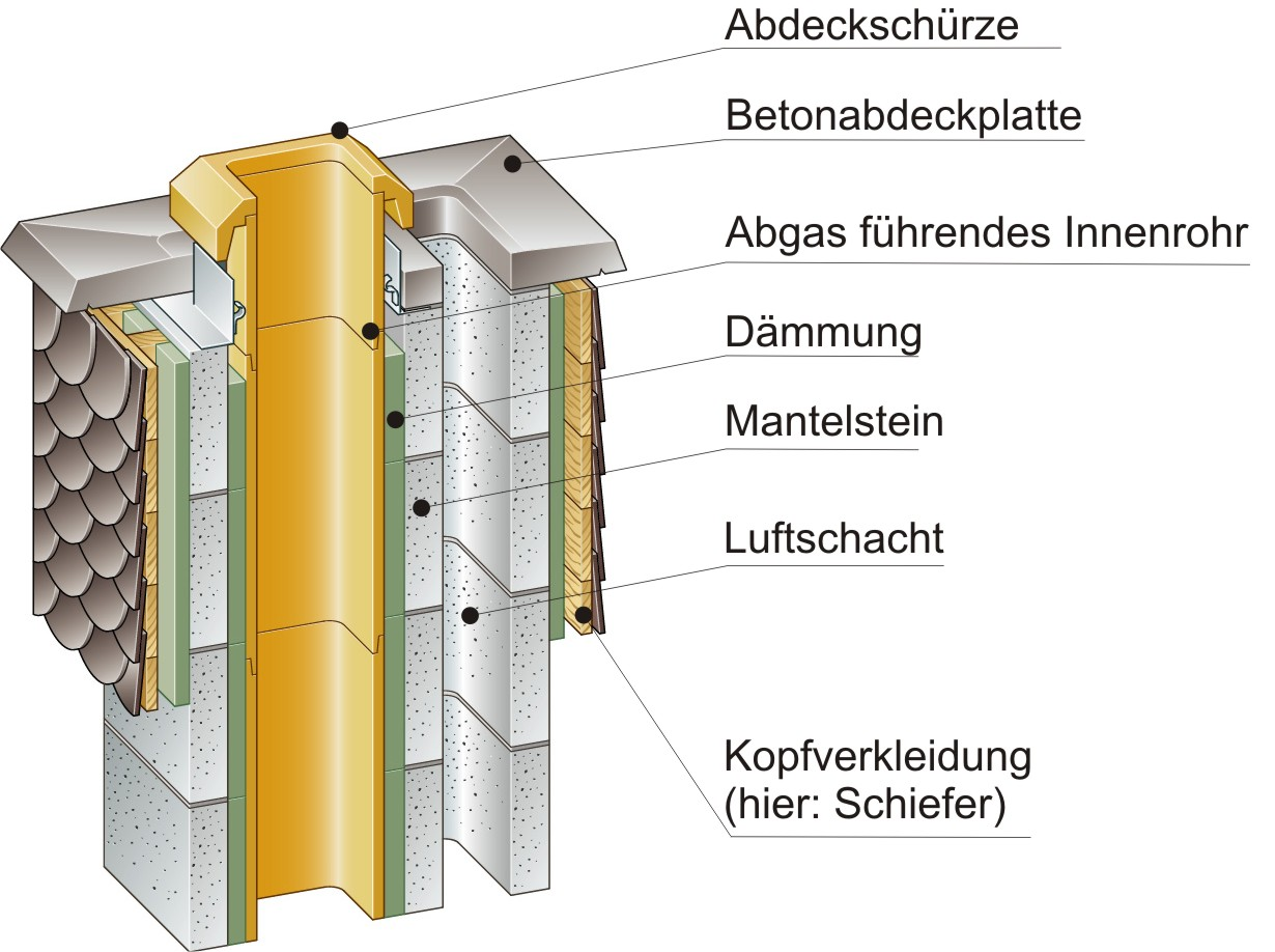 Isomit 90 Schornsteinkopf Detail